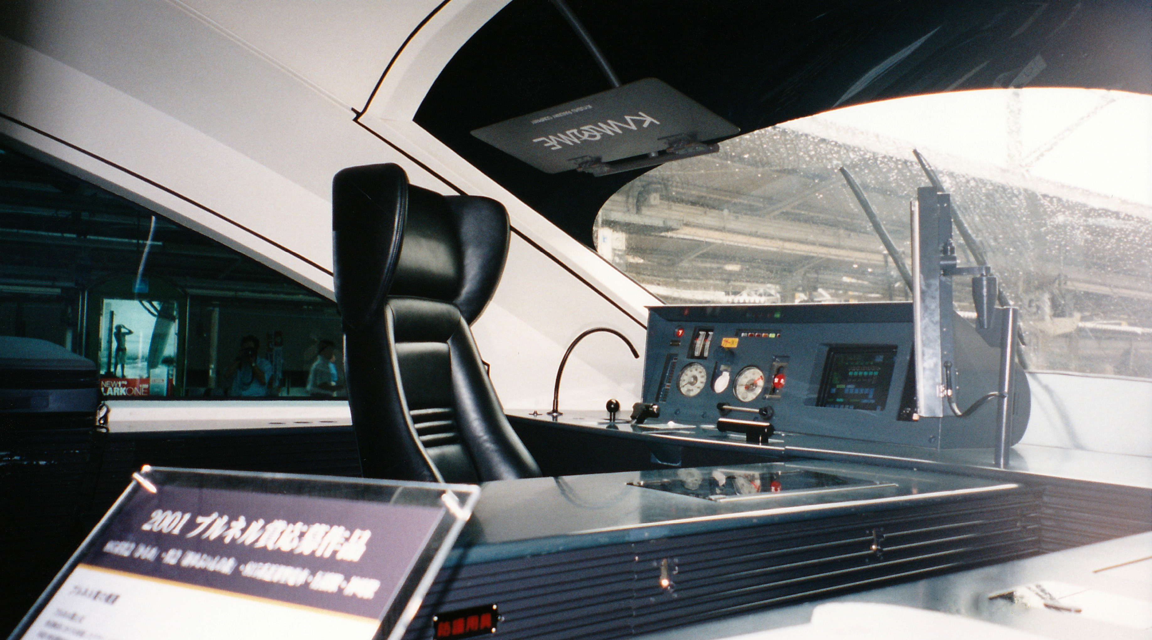 JR九州885系電車運転台。（ブルーリボン賞授賞式時開催の見学会で撮影）